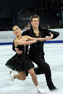 Елена Ильиных и Никита Кацалапов на Чемпионате Европы 2014